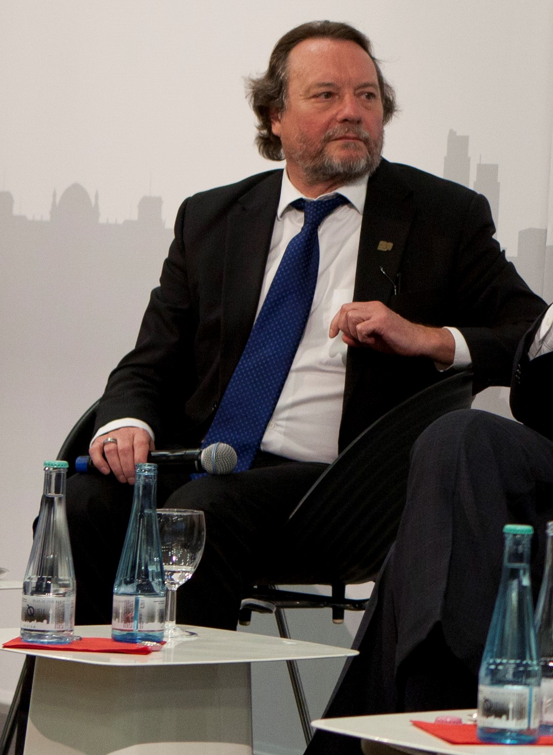 Helmut K. Anheier at Hertie School Berlin, April 2016